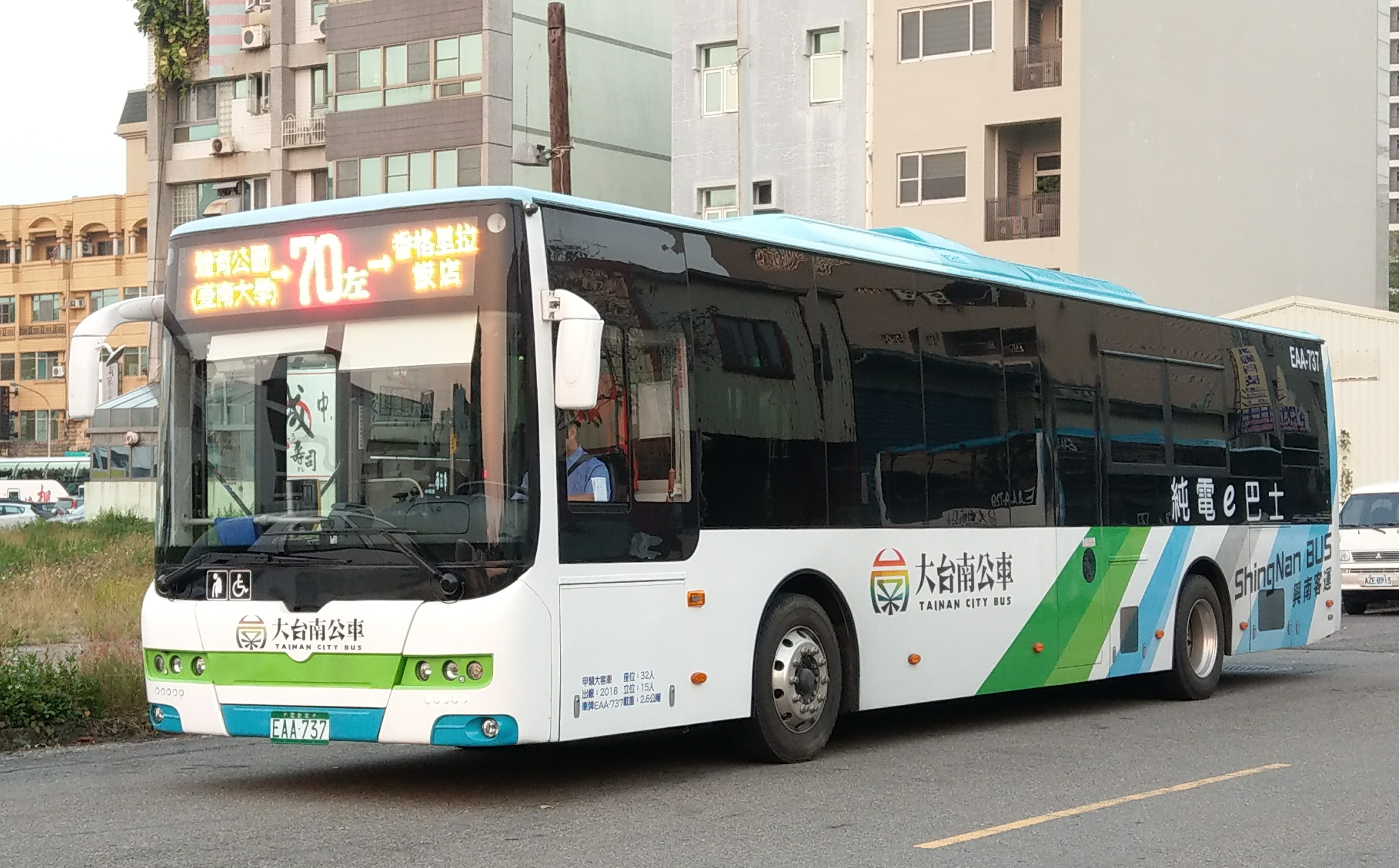 興南客運2018年12月出廠金旅 XML6125JEV，中華環線配車EAA-737